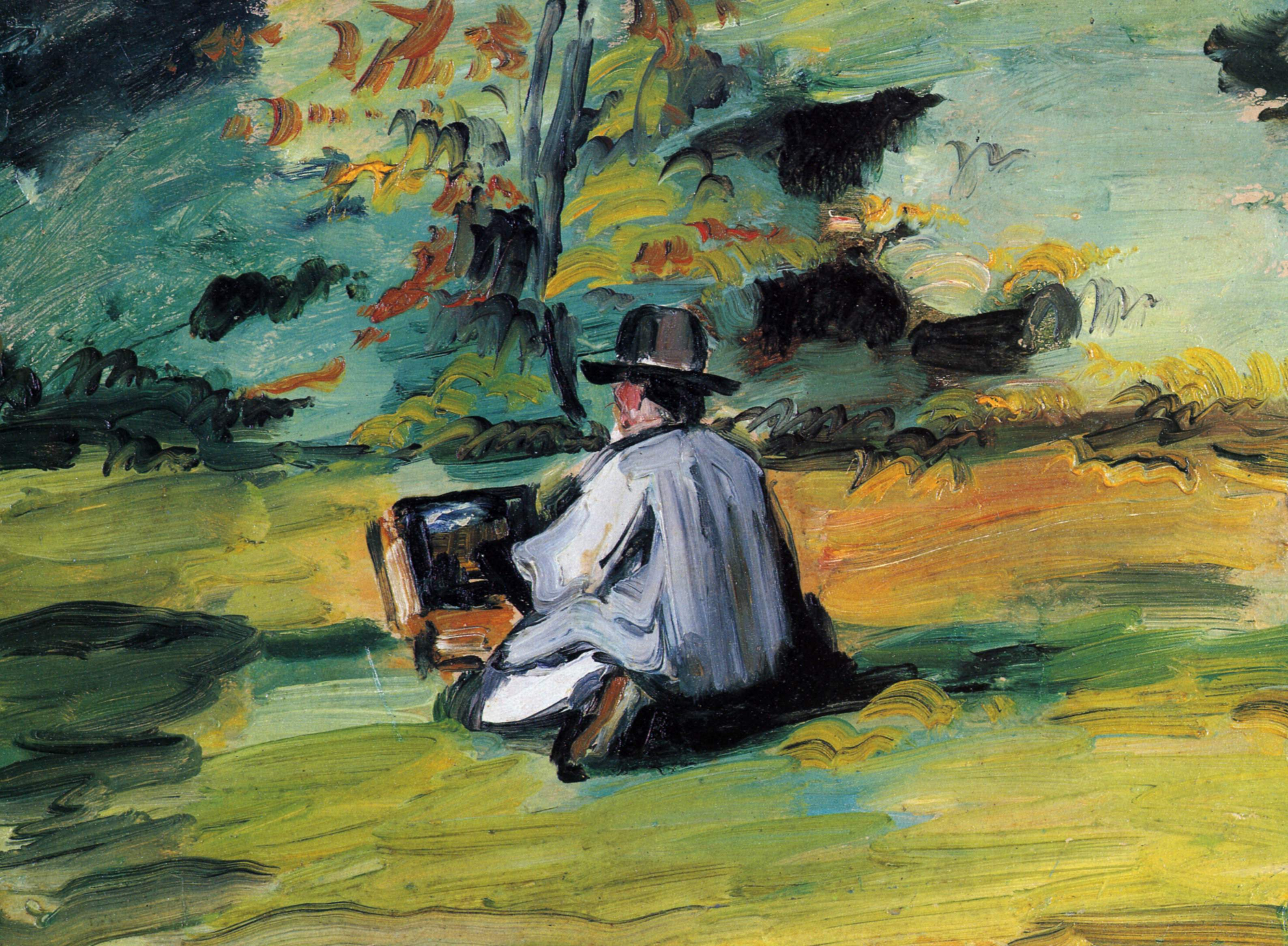 Ein Maler bei der Arbeit